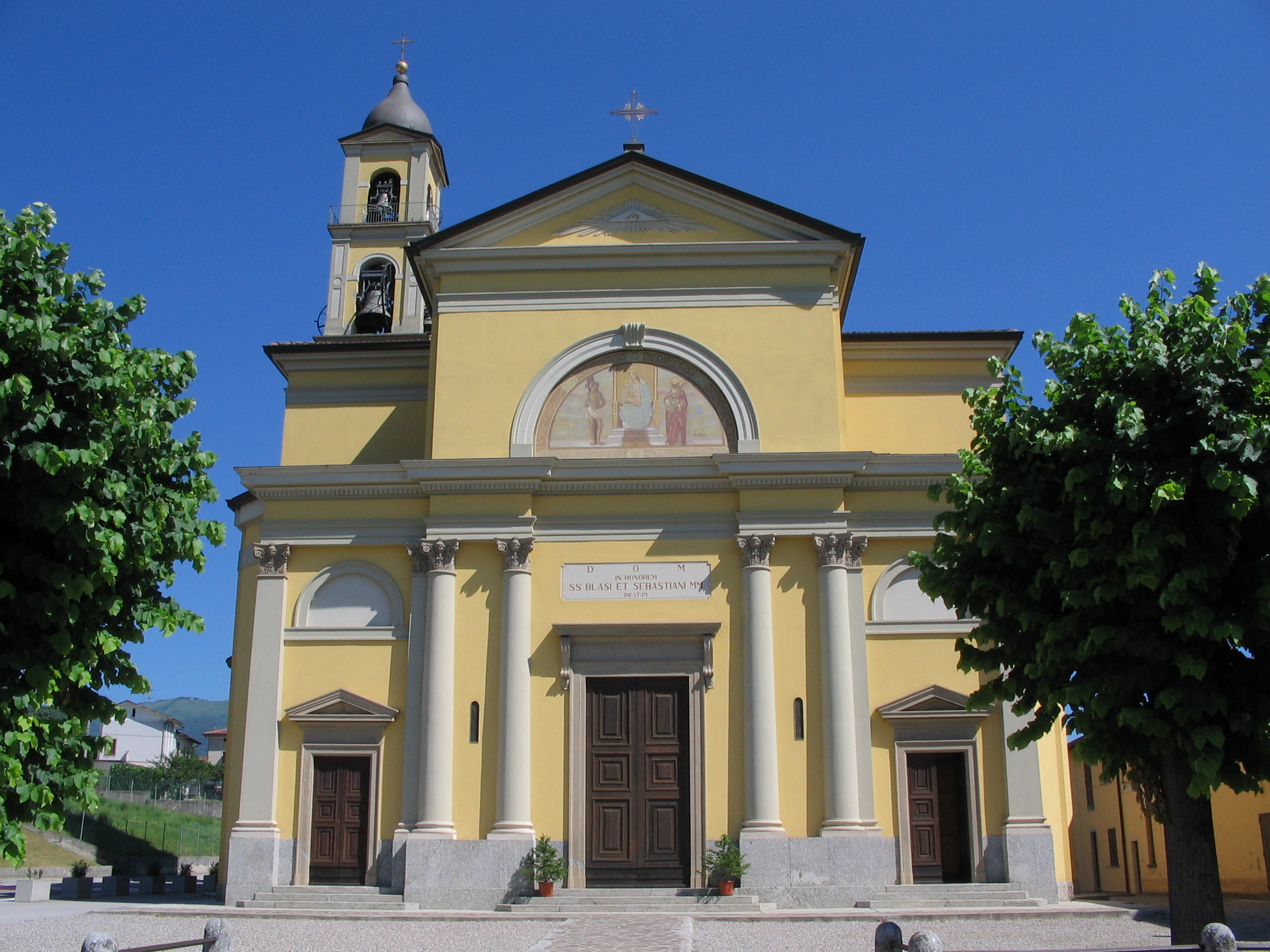 Autore Giorces. Monguzzo, S. Biagio e S. Sebastiano.